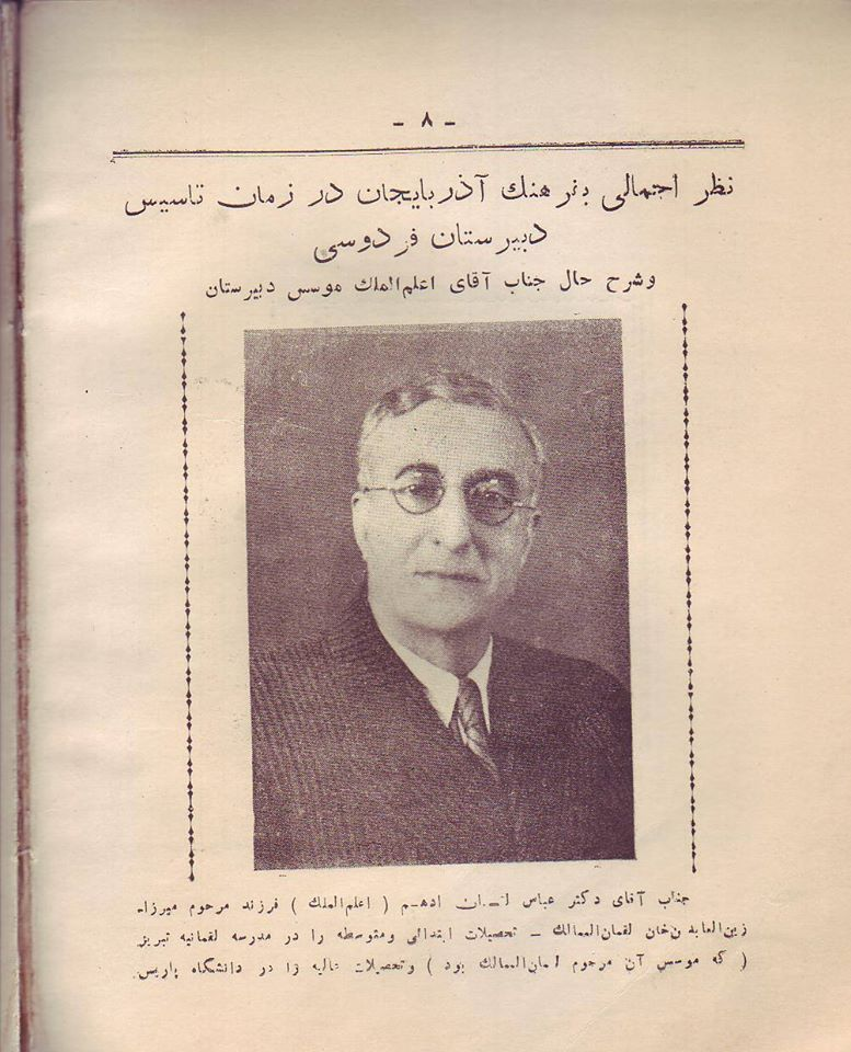 جناب آقای اعلم الملک موسس دبیرستان فردوسی تبریز